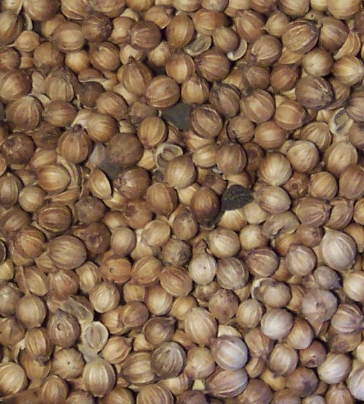 Koriandersamen Größe (Durchmesser): 2-3 mm Selbst fotografiert